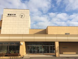 Hakodate University